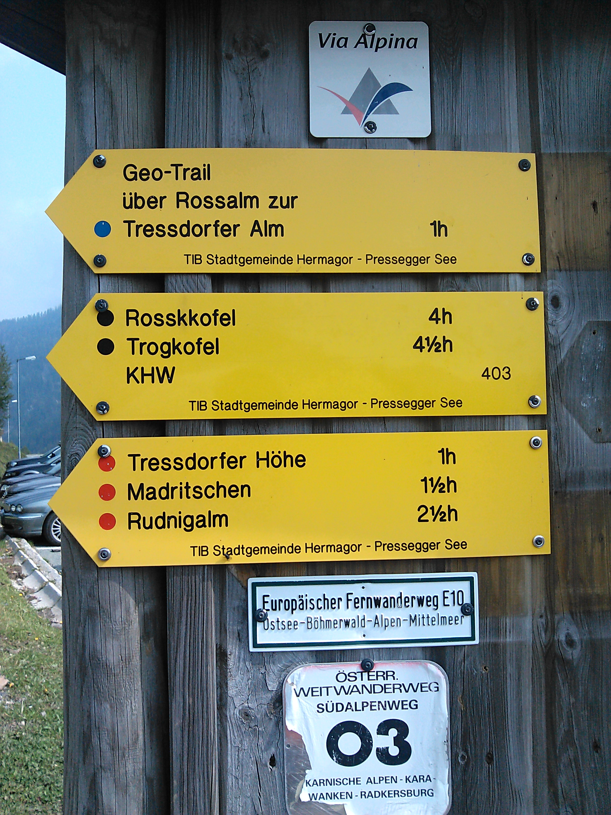 Typische beschilderte Wanderwege in Österreich (Nassfeld)